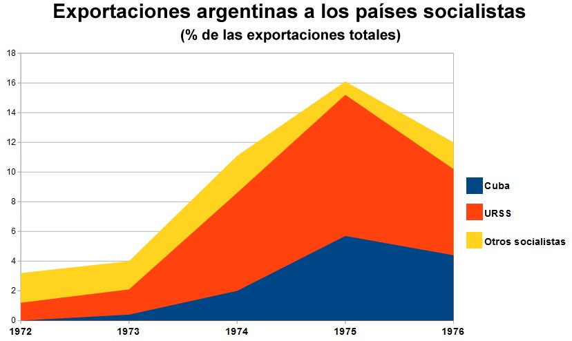 Exportaciones argentinas a los países socialistas como % de las exportaciones totales. Período 1972-1976. Fuente: Gerchunoff, Pablo; Llach, Lucas (1998). «Pacto Social, armonías y discordias». El ciclo de la ilusión y el desencanto. Un siglo de políticas económicas argentinas. Buenos Aires: Ariel. p. 341. ISBN 9509122572.